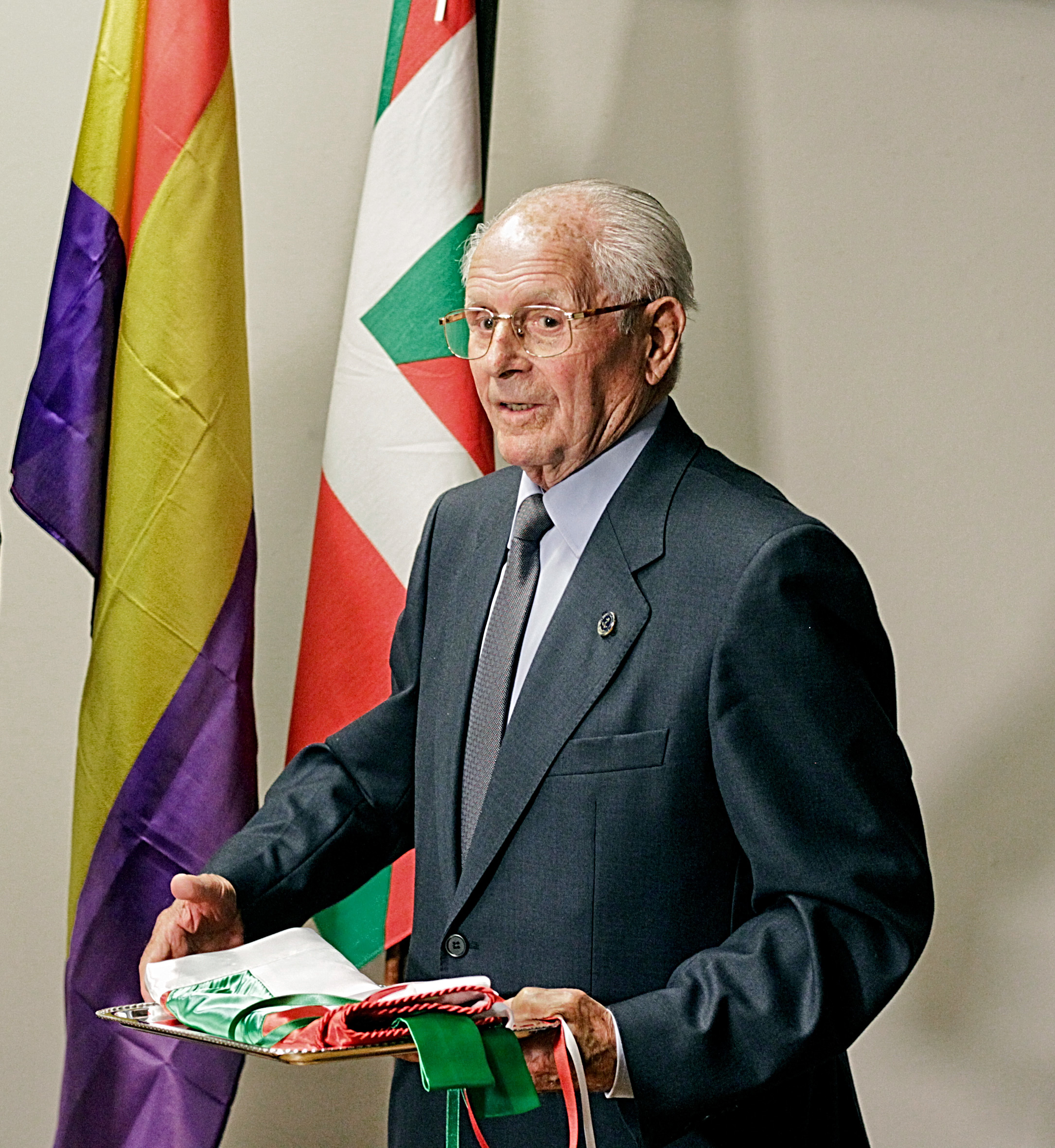 Homenaje a Juan Azkarate, último superviviente de la Marina de Guerra Auxiliar de Euzkadi